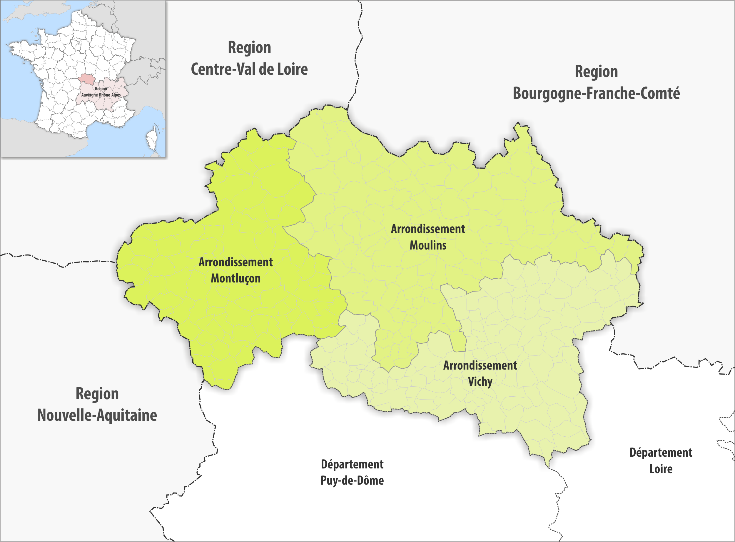 Gemeinden und Arrondissemente im Departement Allier